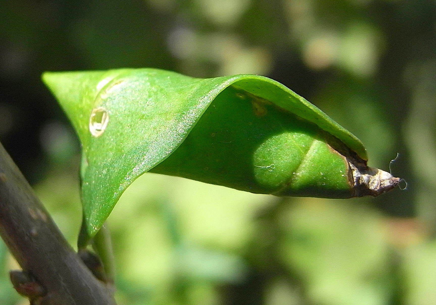 Blattwickel aus Ligusterblatt von Caloptilia cuculipennella, mit Auschlupfloch Ricoh R8